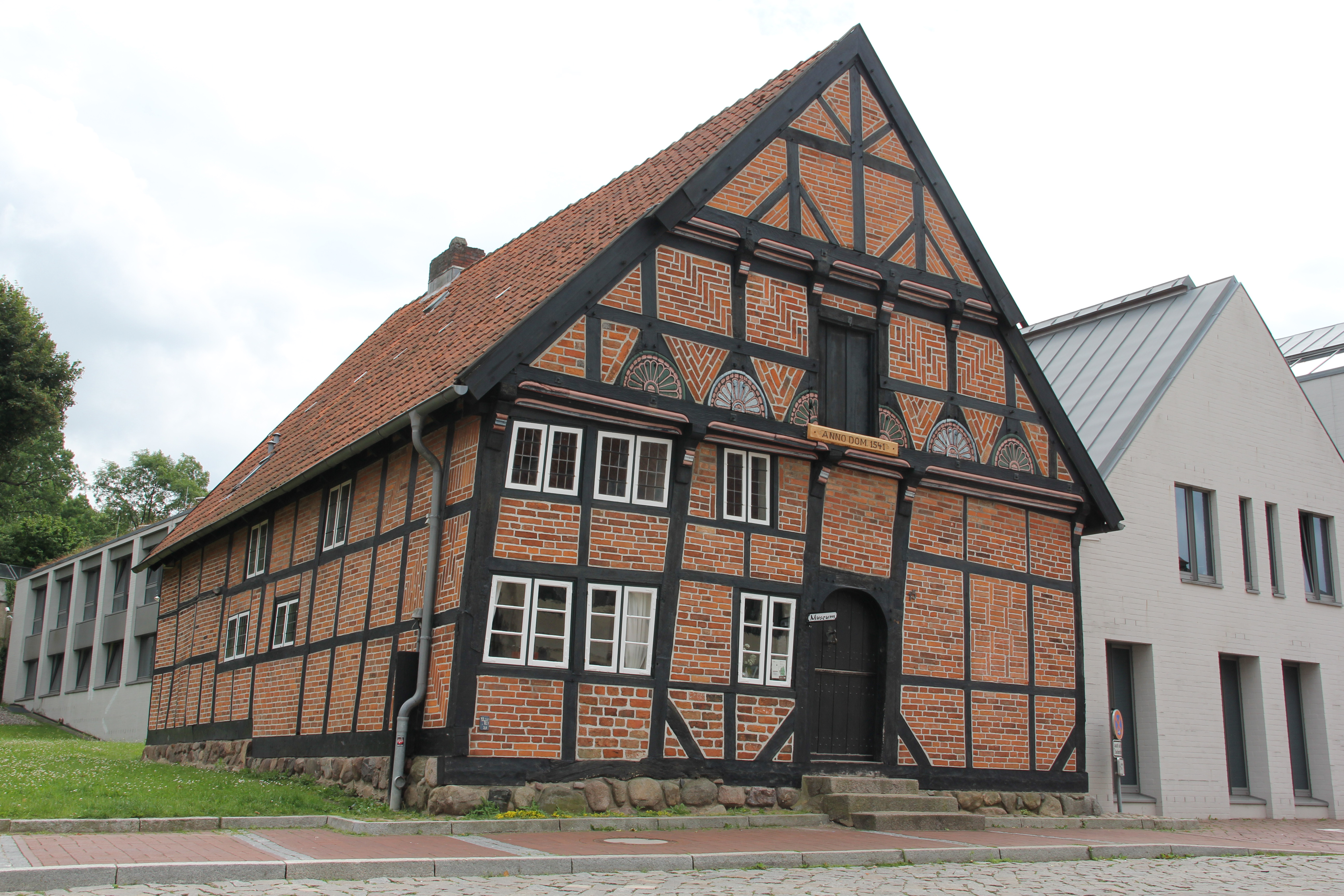 Bad Segeberger Bürgerhaus. Schlichtes Dielenhallenhaus aus dem Jahr 1534. Ältestes Haus der Stadt. Heute Museum.